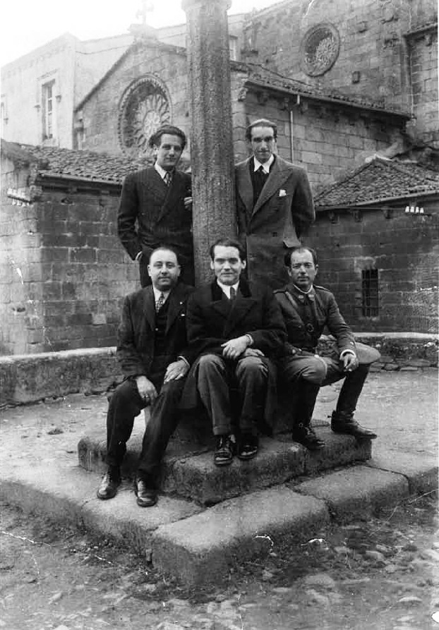 García Lorca en Betanzos con Ramón Fernández Cid, José Álvarez Sánchez-Heredero, Francisco Esteve Barbá e José Barbeito.